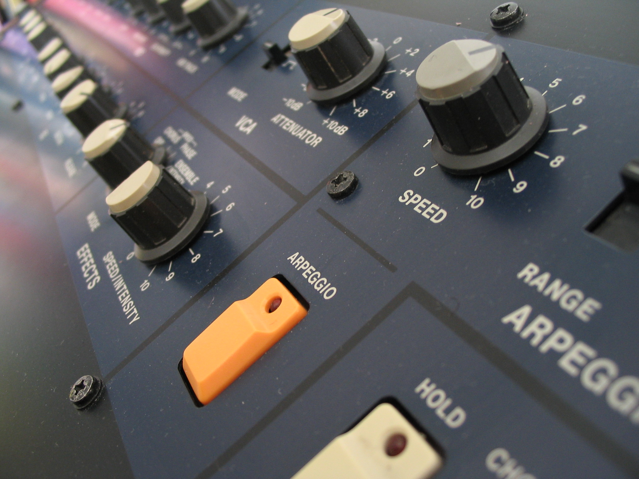 KORG Polysix panel (arpeggiator)